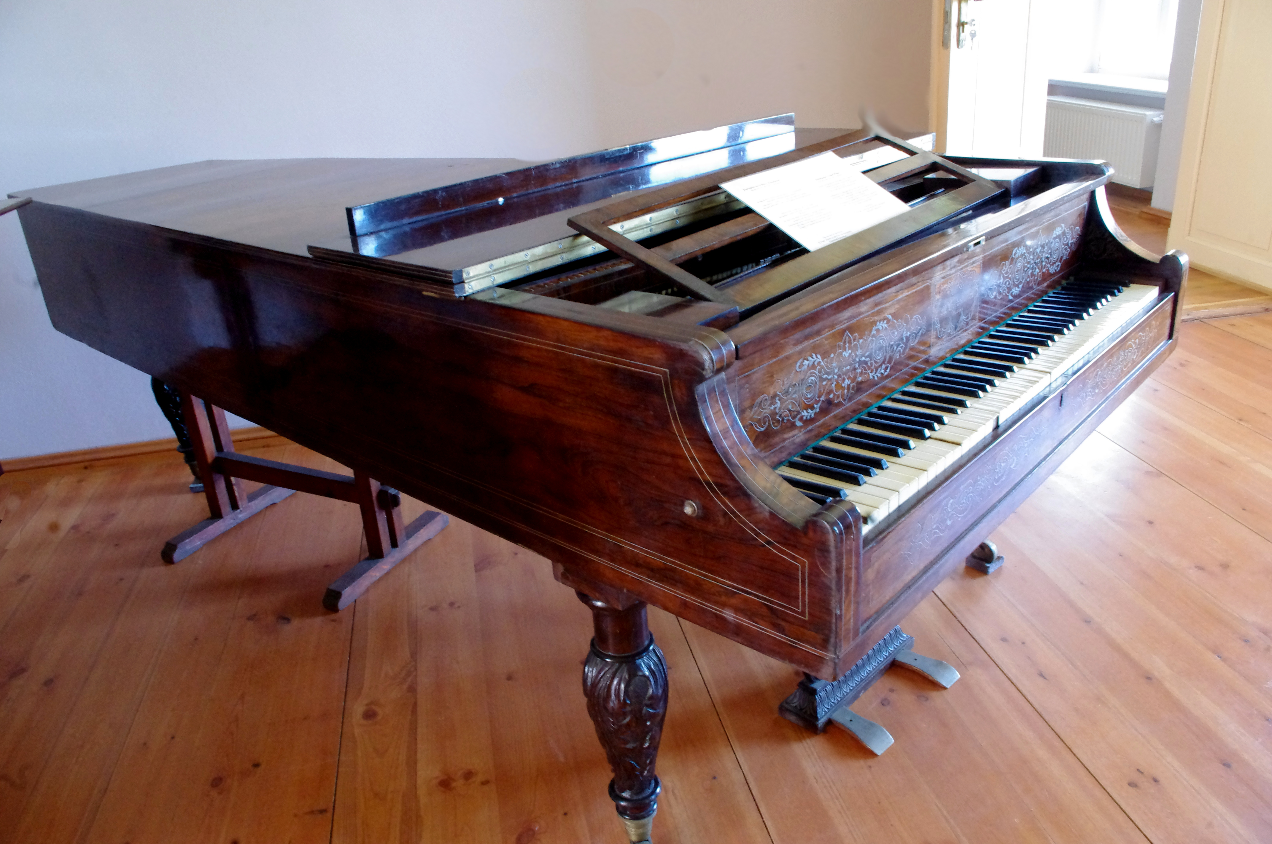 Ostromecko, pałac, tzw. Stary, 1758-1766